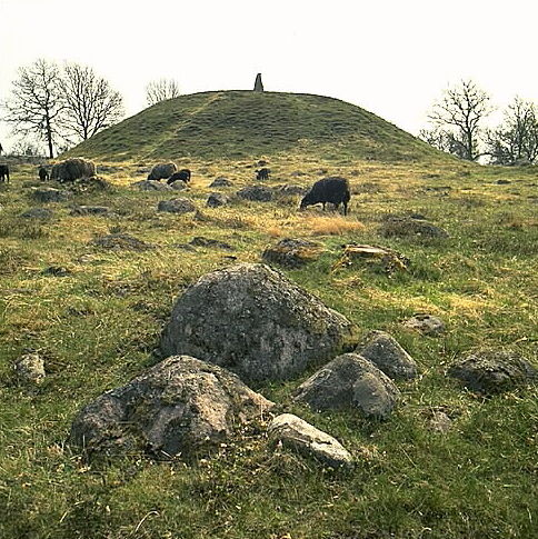 Gravhögen och betande får. Bilden troligen från slutet av 1960-talet. Motiv: Östra Torsås 1:1 Nyckelord: Raä-Fastigheter, Riksintressen Kategori: Hög Gravhögen och betande får. Bilden troligen från slutet av 1960-talet. Östra Torsås 1:1.